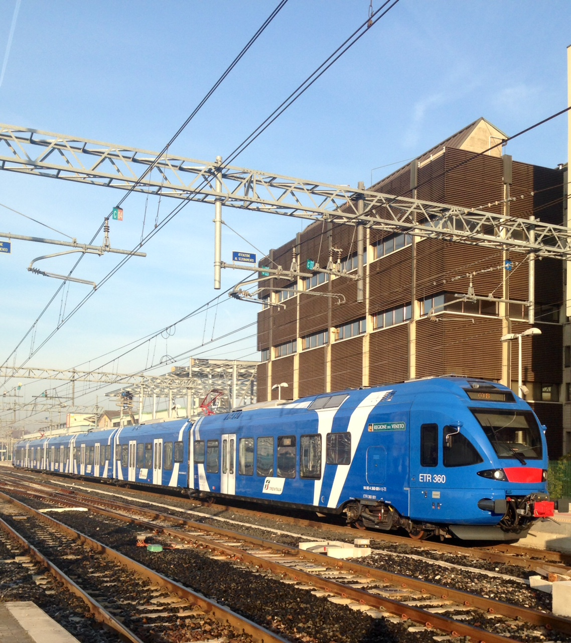 Flirt al binario 1G pronto per partire come treno regionale per Portogruaro